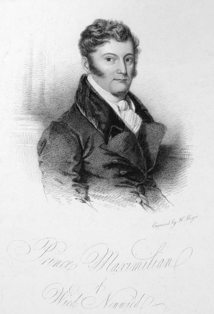 Maximilian zu Wied-Neuwied, German ethnographer